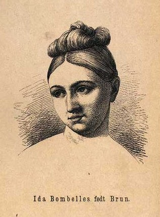 Ida Bombelles, født Brun (1792-1857), danser og sangerinde.